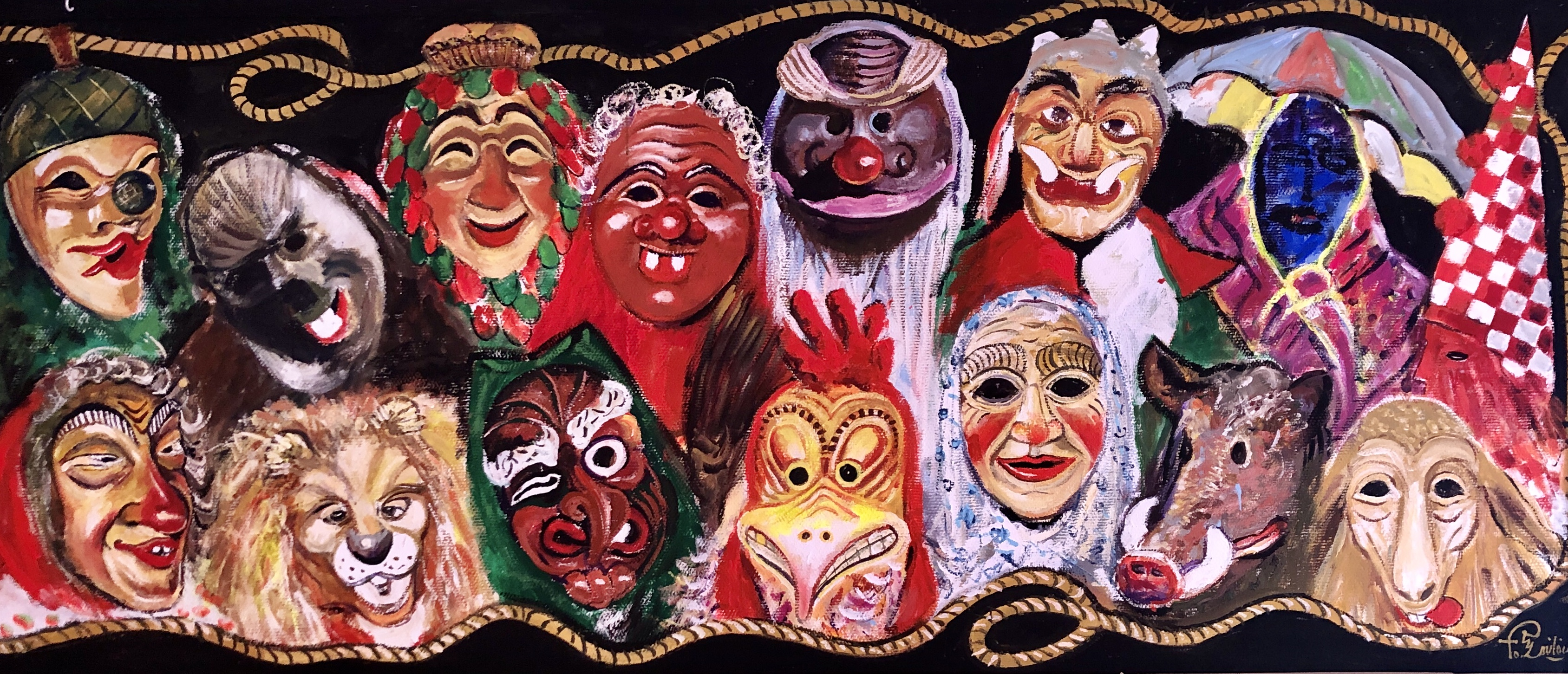 Masken